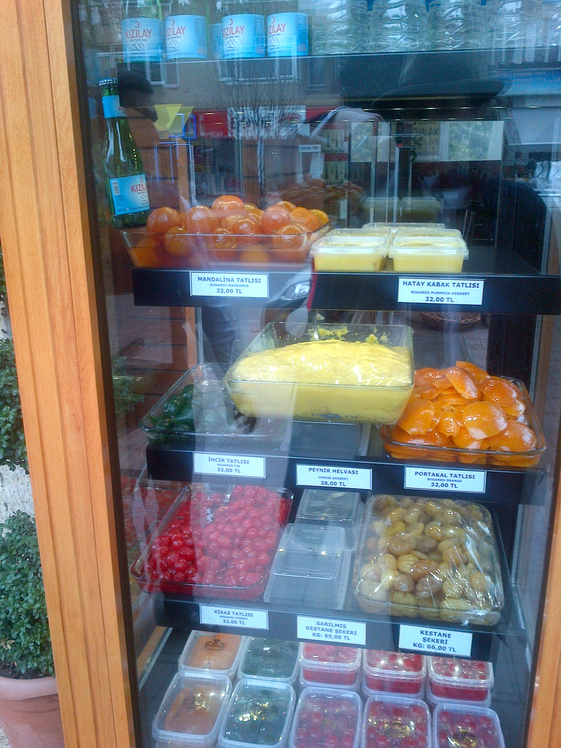 Dulces de frutas (mandarina, higos, cascara de naranja y otras), dulce de castana y Peynir Helvası (un postre de queso) en la vitrina de una dulceria turca en Göztepe, Kadıköy.